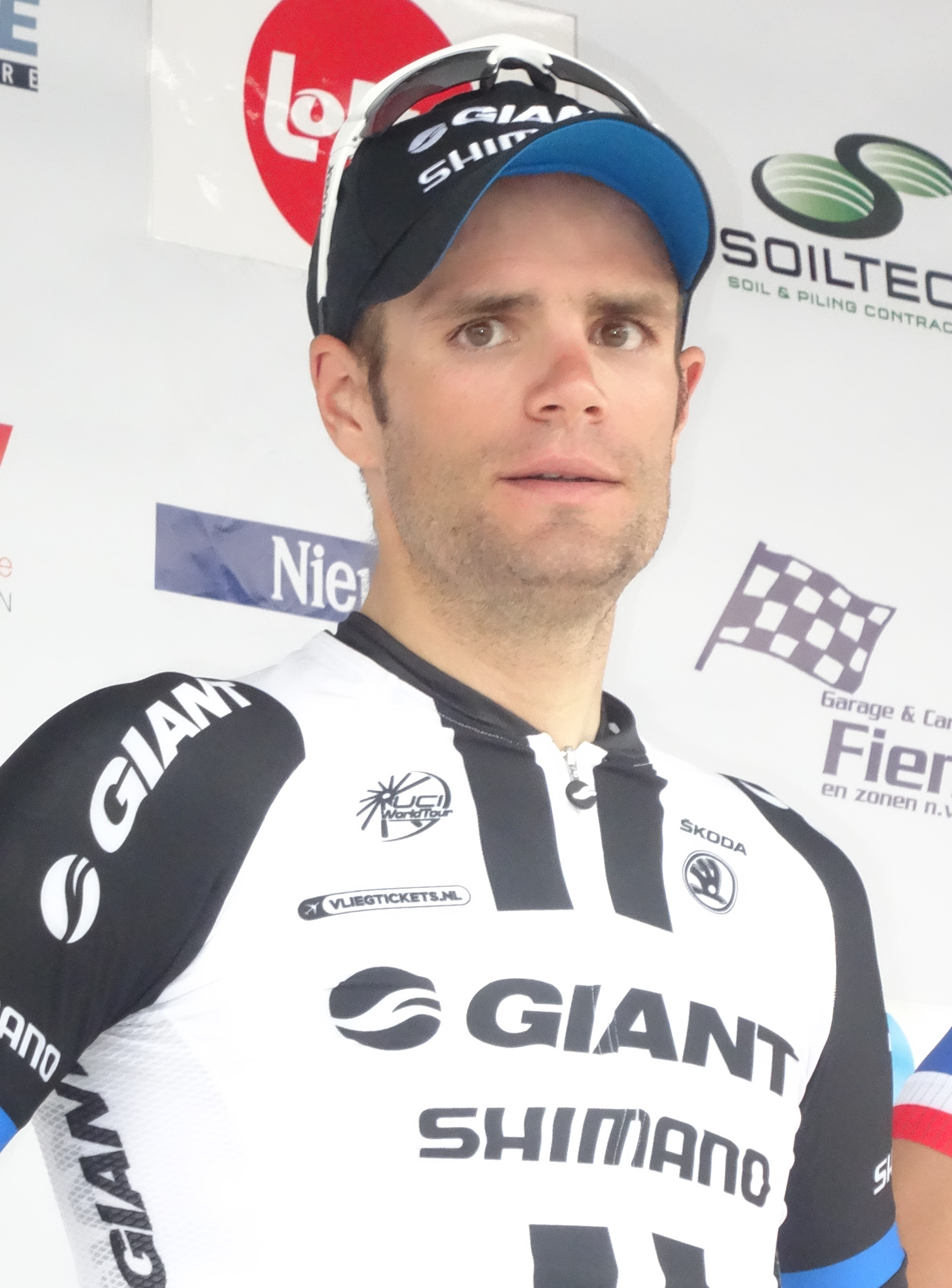 Reportage réalisé le vendredi 19 septembre à l'occasion du départ et de l'arrivée du Championnat des Flandres 2014 à Koolskamp (Ardooie), Belgique.